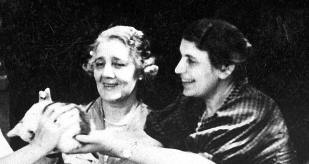 Portrait of M. Klein, A. Freud, E. Jones. Archives & Manuscripts Keywords: a freud; cmac/kle; e jones; klein melanie; Melanie Klein